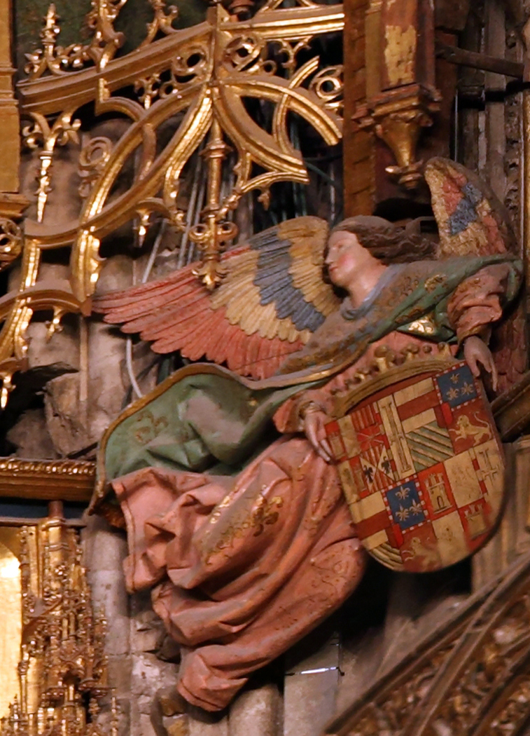 Detalle del ángel de la parte derecha del retablo mayor de la Catedral de Toledo (España)